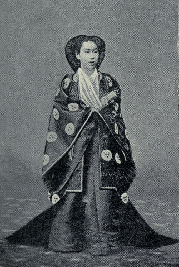 熾仁親王妃董子